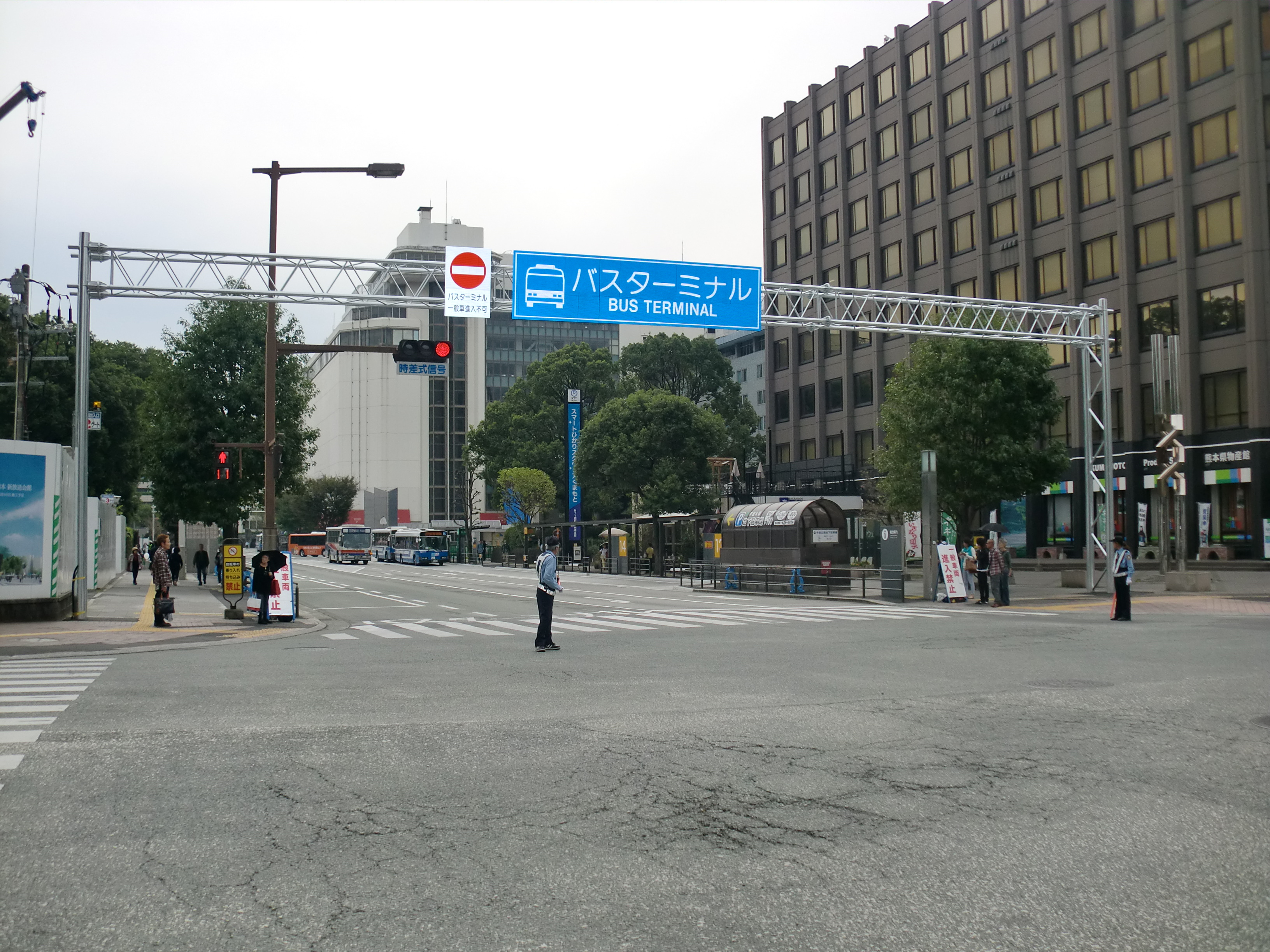 熊本交通センター（臨時）